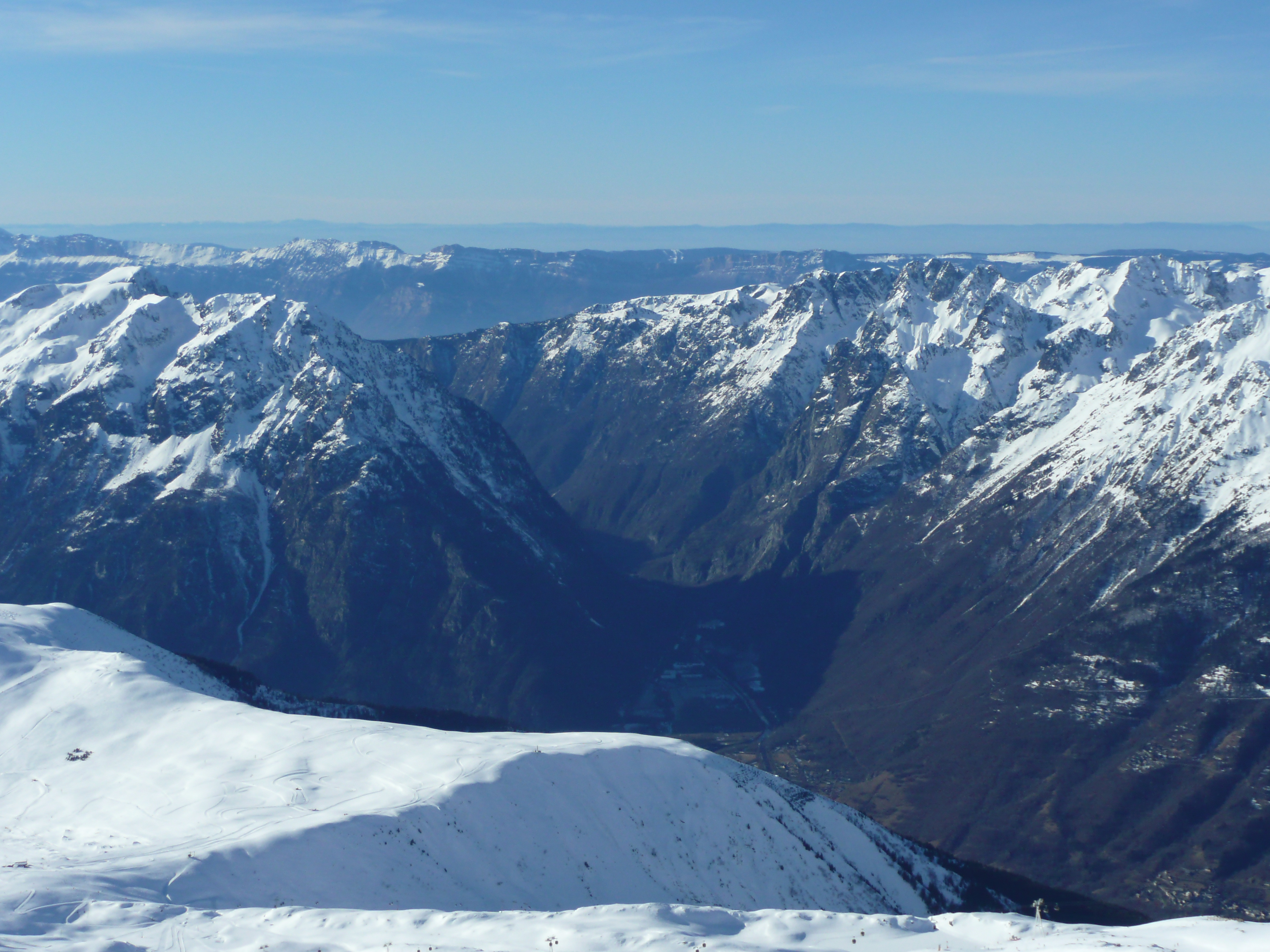 Vallée de la Romanche